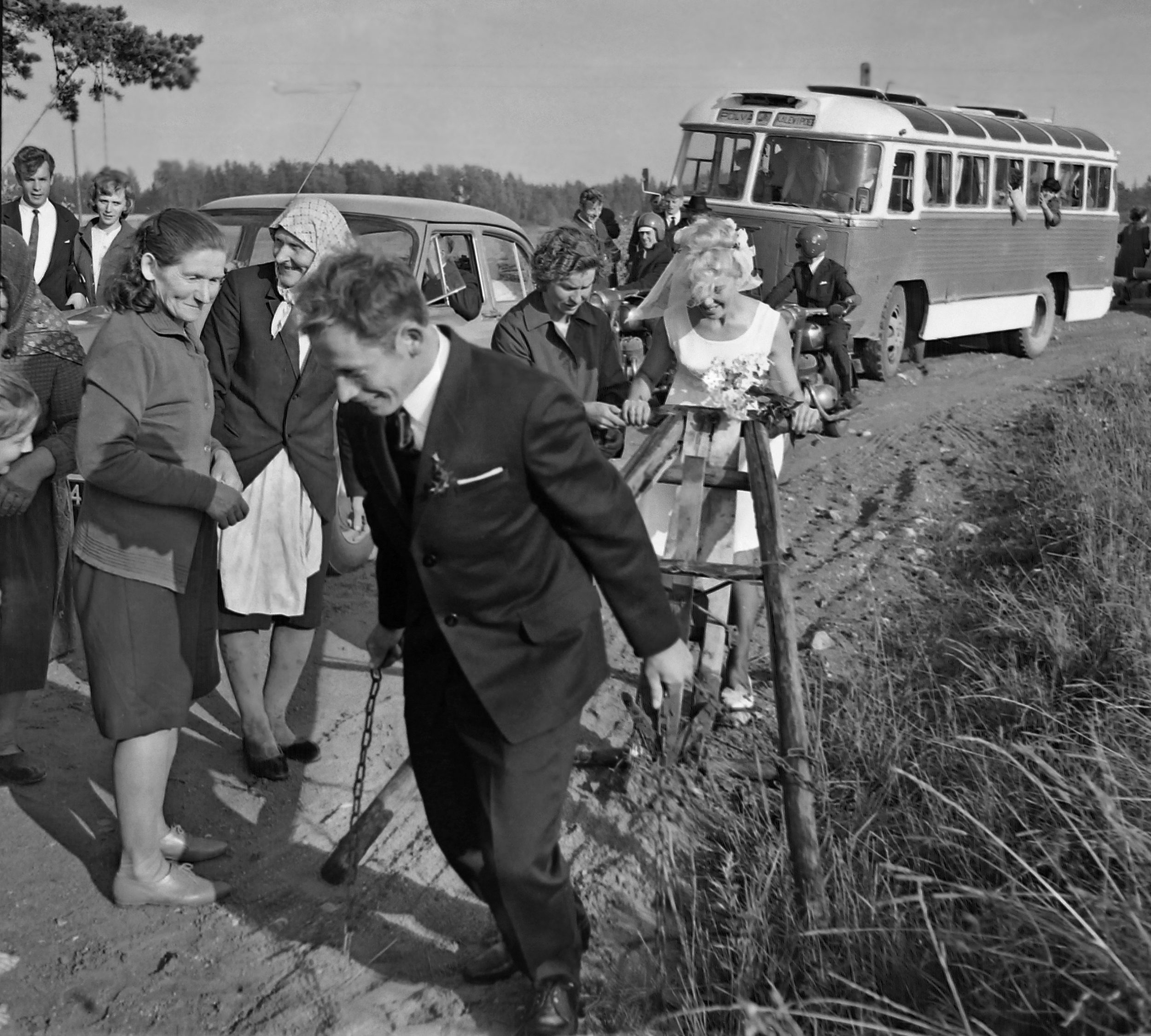 Pulmakombena pidi pruut oskama atra hoida. Pulmad "Kalevipoja" kolhoosis Põlva raj. 1968